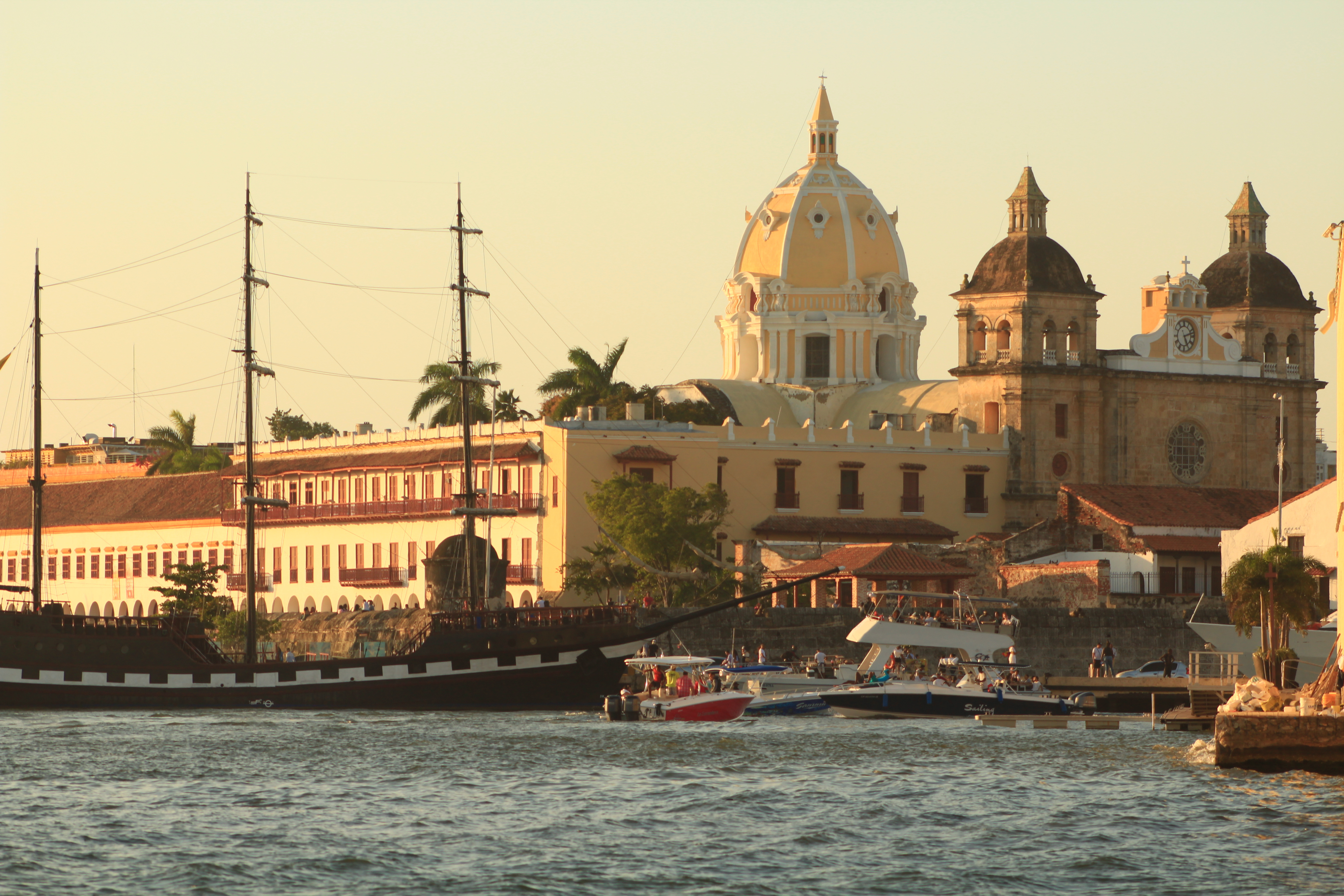 Arquitectura colonial en el centro histórico de Cartagena